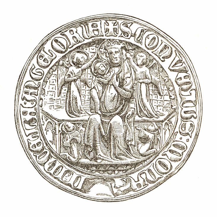 Zeichnung aus dem Jahrbuch der kaiserl. königl. Central-Commission zur Erforschung und Erhaltung der Baudenkmale III. 1859. Aufsatz von Karl von Sava, Sphragistiker, mit dem Titel: Die mittelalterlichen Siegel der Abteien und Regularstifte im Erzherzhogtum Österreich ob und unter der Enns Zuordnung der Zeichnungen entsprechend den Dateinamen